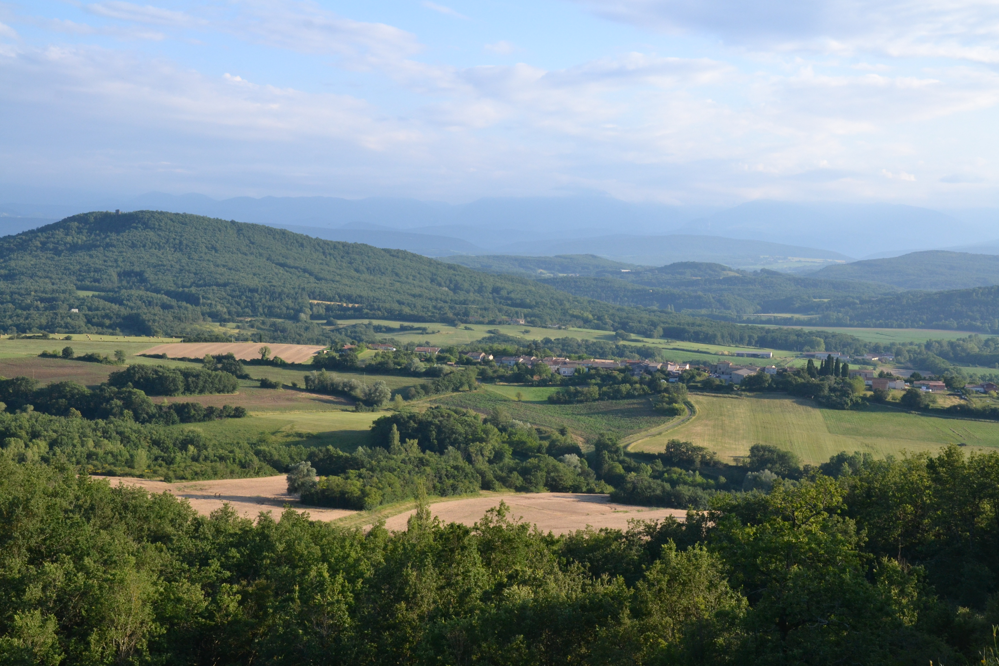 Tréziers (Aude, France), vue depuis les hauteurs du Cazal des Faures (Moulin-Neuf, Ariège, France).